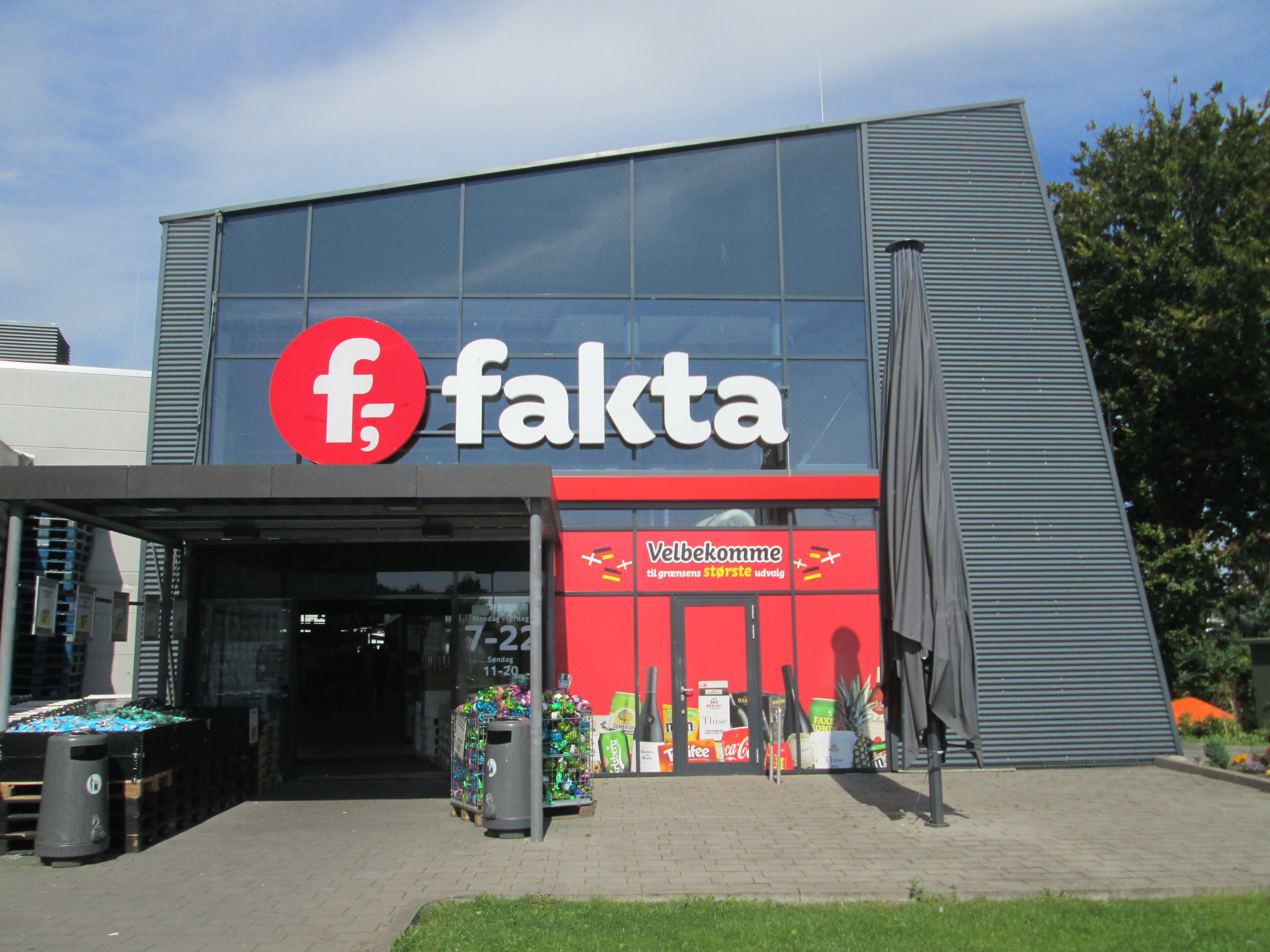 Fakta i Harreslev ved Flensborg.